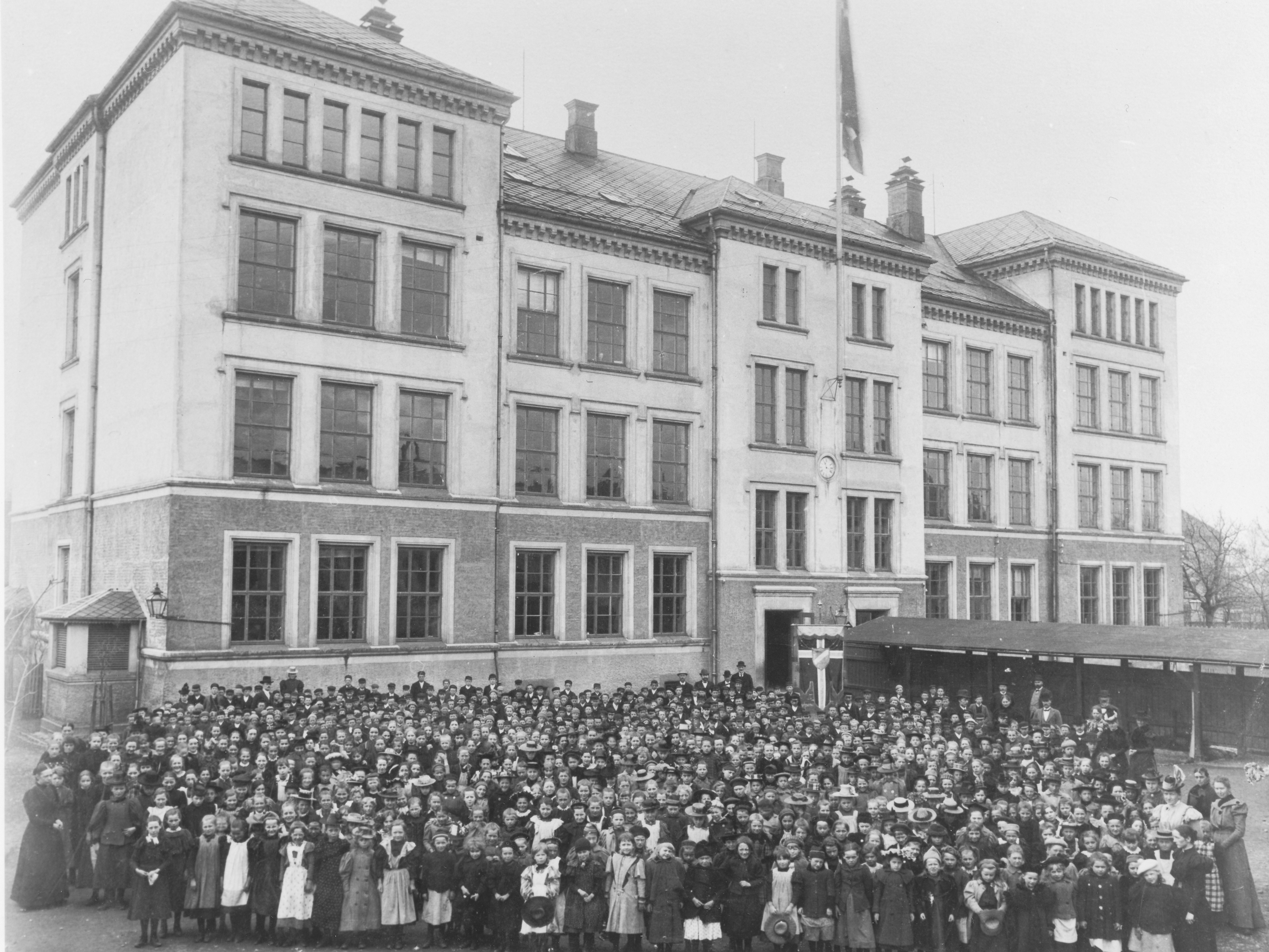 Kalvskinnet skole i Bispegata 9 C åpnet 1887. Arkitekt Ole Falck Ebbell (1839 - 1919). Ukjent fotograf, ukjent årstall.